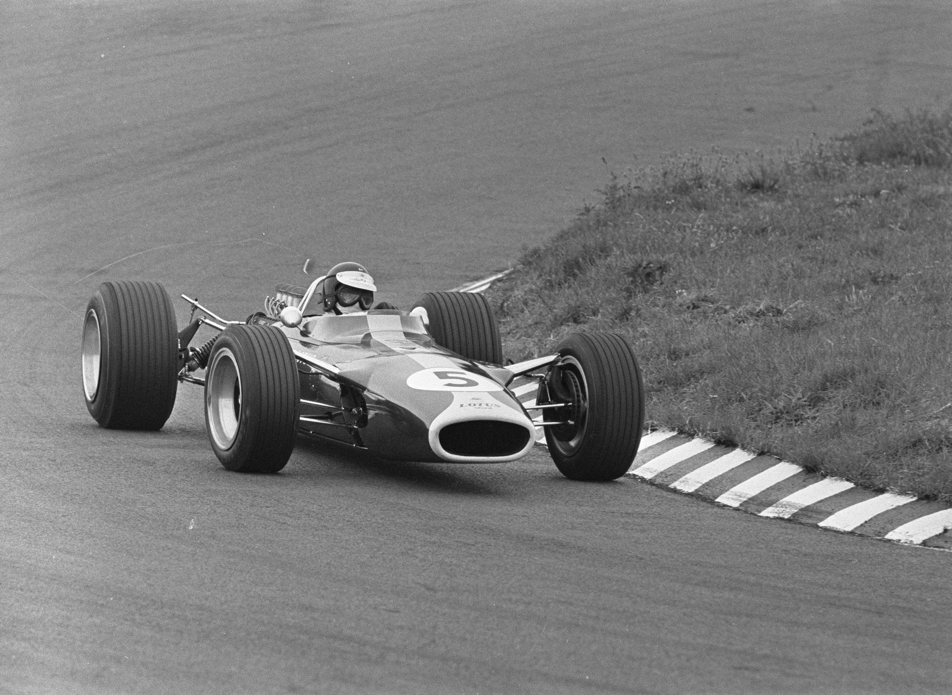 Training Grand Prix te Zandvoort.